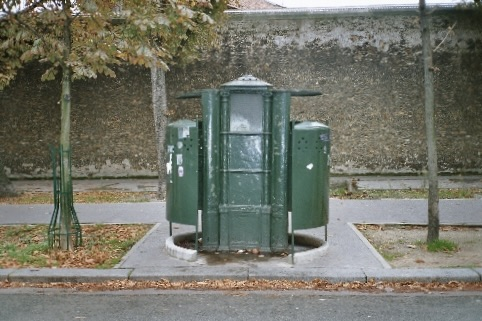 La dernière vespasienne de Paris, située devant la muraille de la prison de la Santé, sur le trottoir du boulevard Arago dans le XIVe arrondissement de Paris, France. Photo de l'auteur